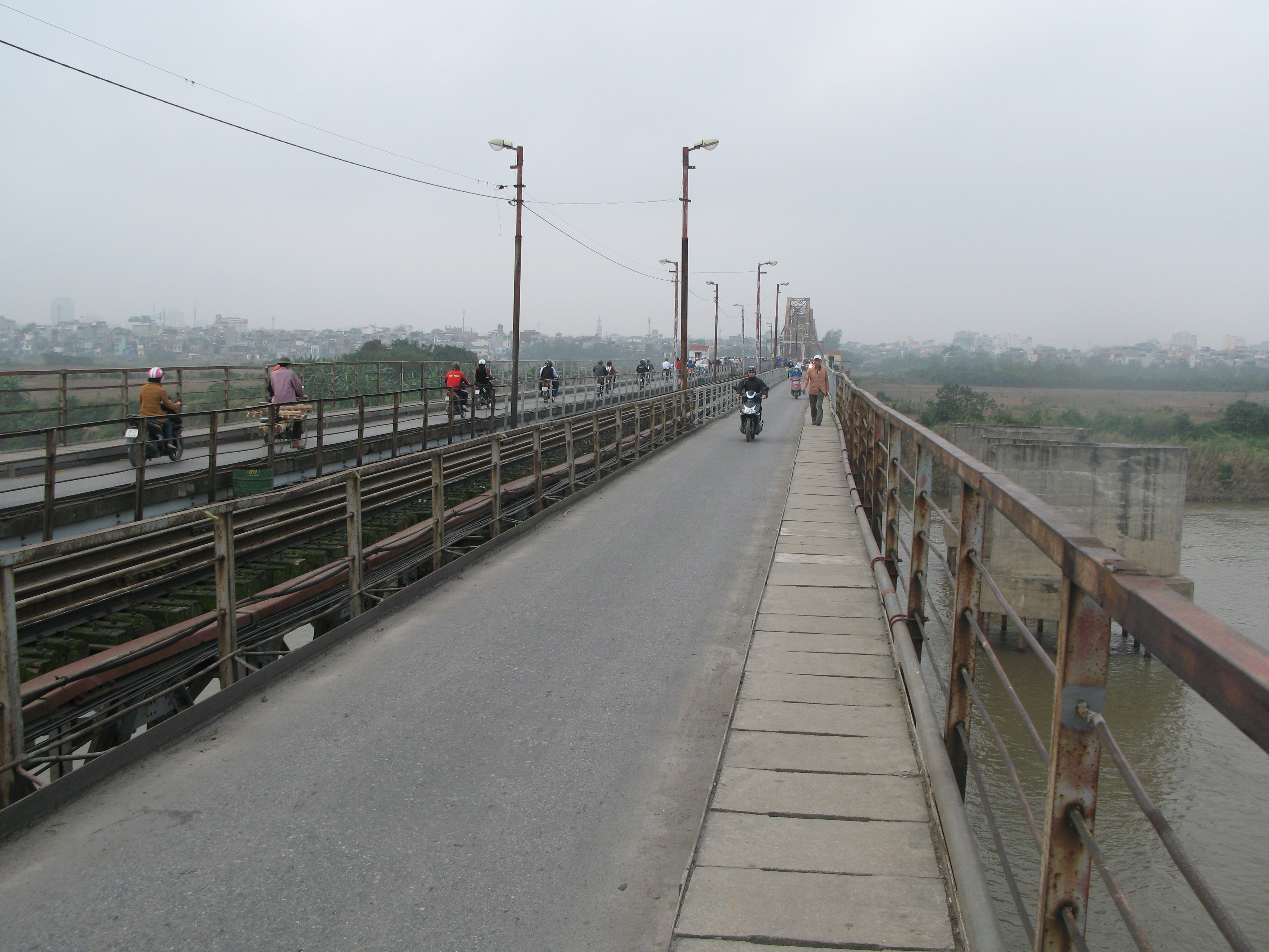 Đoạn cầu Long Biên bị bom Mỹ đánh sập được sửa chữa lại.